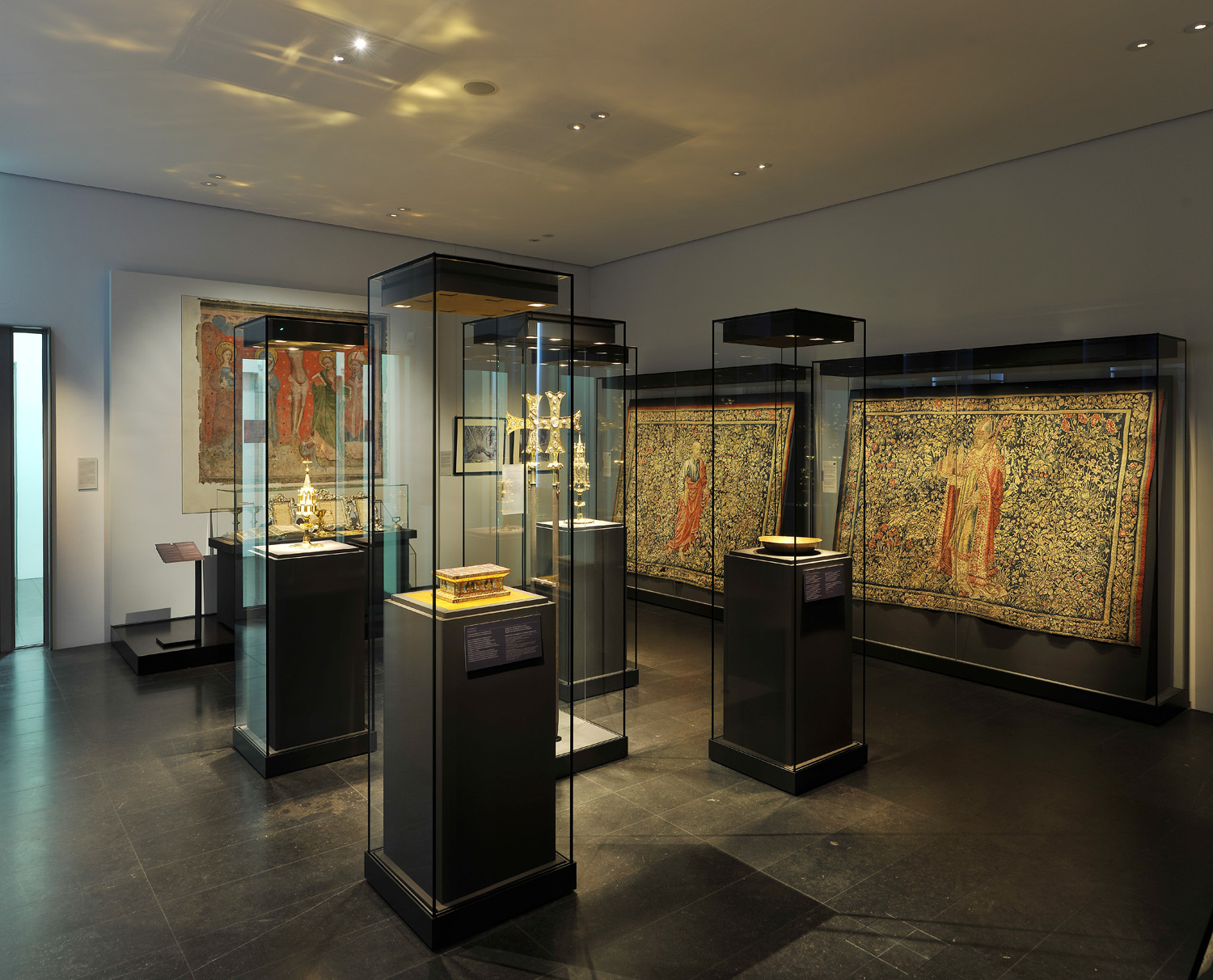 StiftsMuseum Xanten, Raum 6